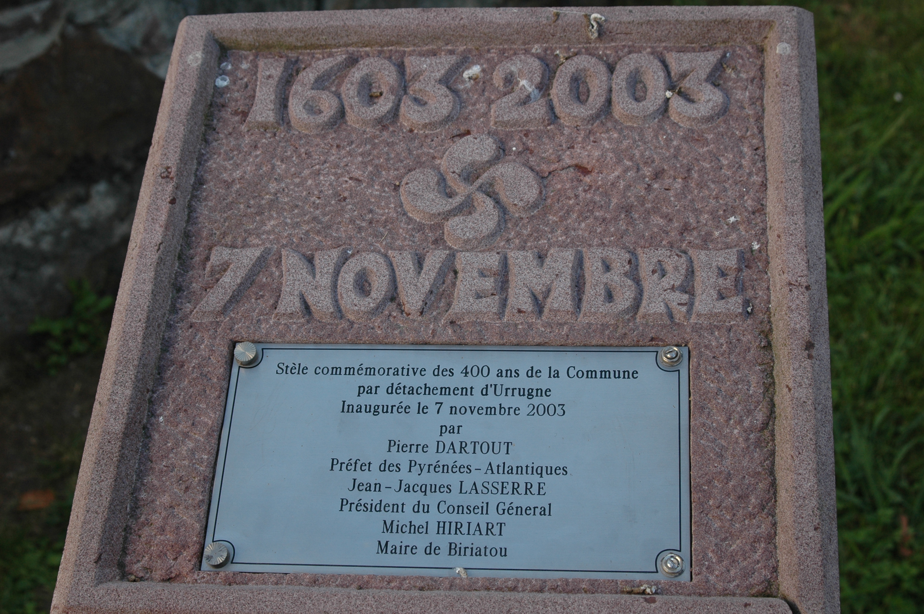 Biriatou, stèle commémorative du détachement de Biriatou de la commune d'Urrugne